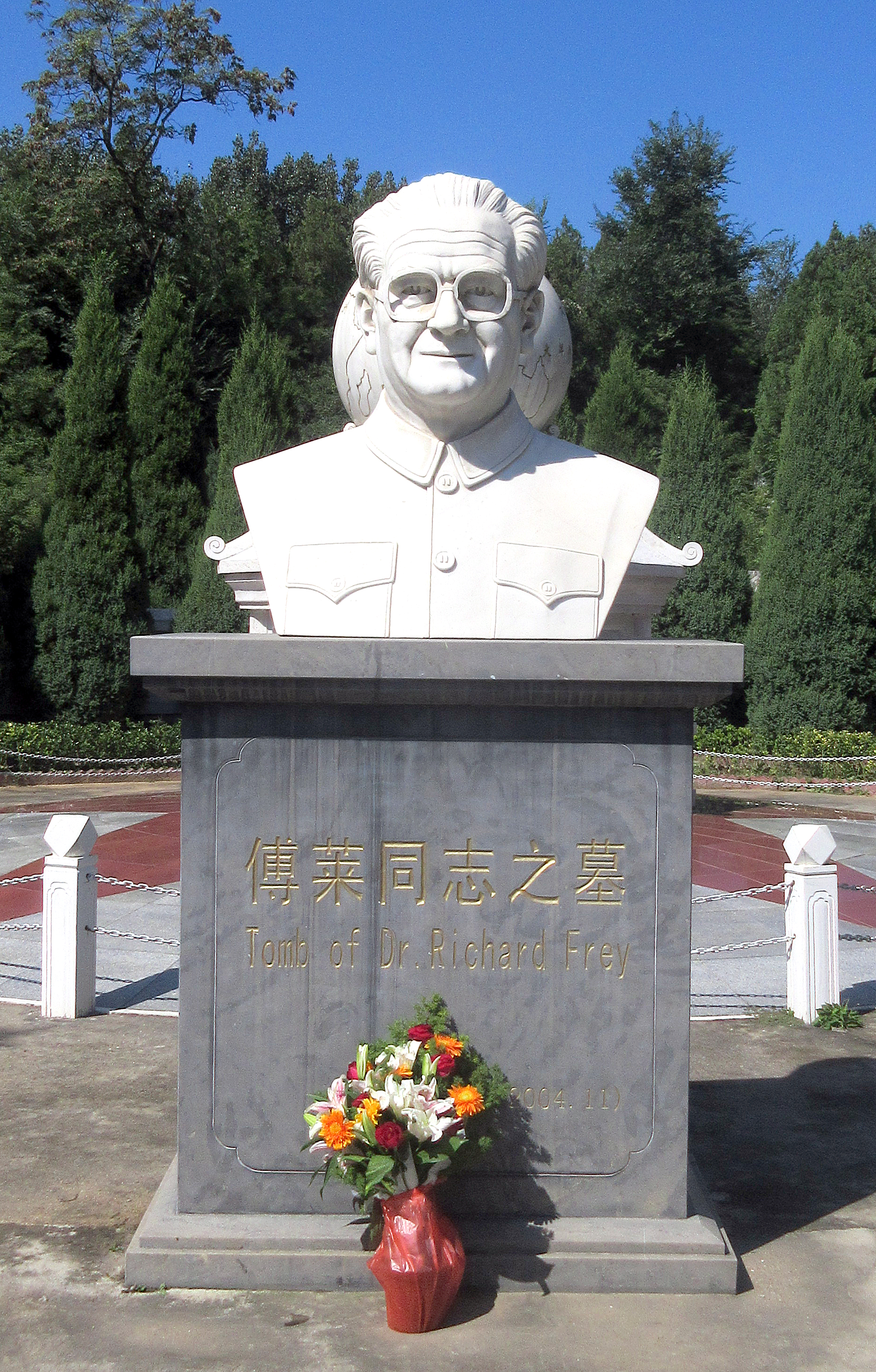 这是一副拍摄于中国河北省唐县烈士陵园中傅莱纪念墓碑的照片